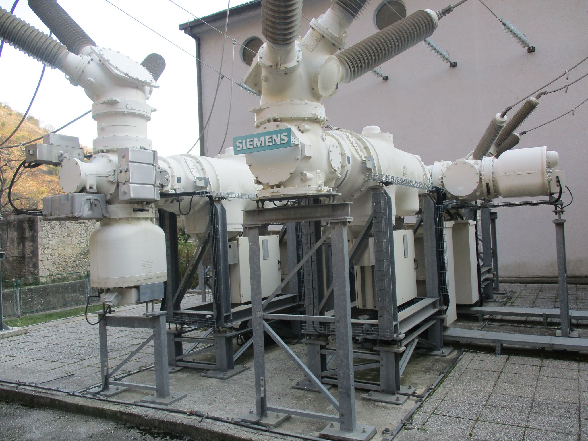 110 kV postrojenje punjeno SF6 plinom